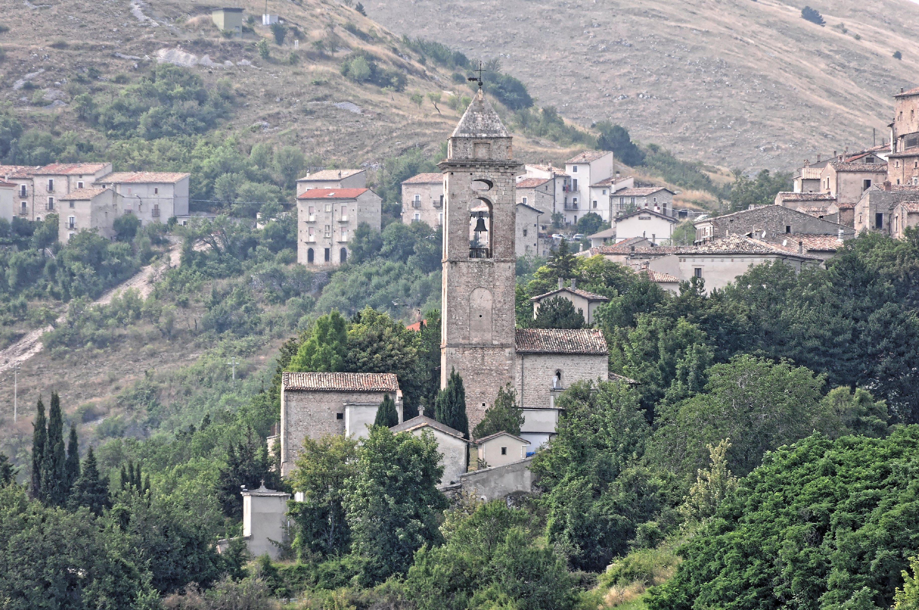 Santo Stefano di Sessanio 2013 Dieses Foto entstand in Zusammenarbeit mit Stadtbesichtigungen.de Die Seiten Stadtbesichtigungen.de, der dazugehörige Reise Blog sowie die Facebookseite: Stadtbesichtigungen Rom dürfen dieses Bild für Ihre Veröffentlichungen ohne den Hinweis auf Wikipedia, Commons bzw der Lizenz verwenden. Die Verantwortlichen habe von mir (Ra Boe) die Originaldaten zur freien Verfügung übermittelt bekommen.